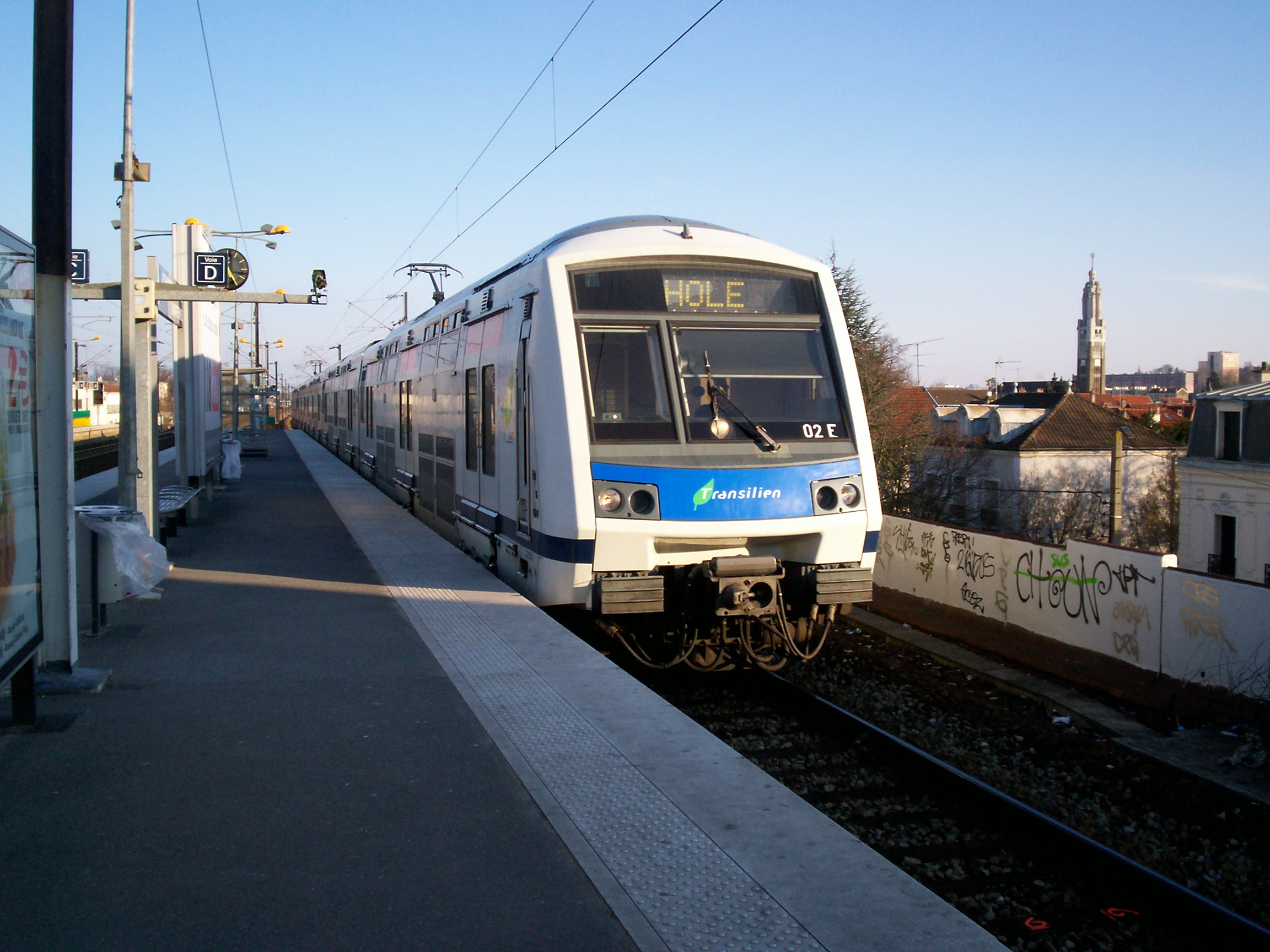 Rame Z22500 arrivant au Raincy